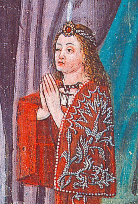 Graf Leonhard von Görz Fresko in der Kapelle von Schloß Bruck, Lienz